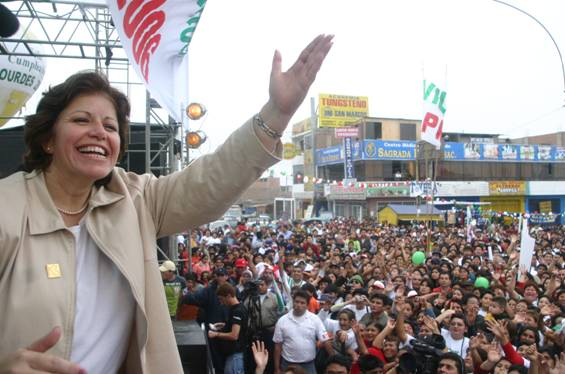 Foto tomada por mi , en un mitin en villa el salvador 2005 (Translation: Photo taken by me, in a meeting in Villa, El Salvador 2005)